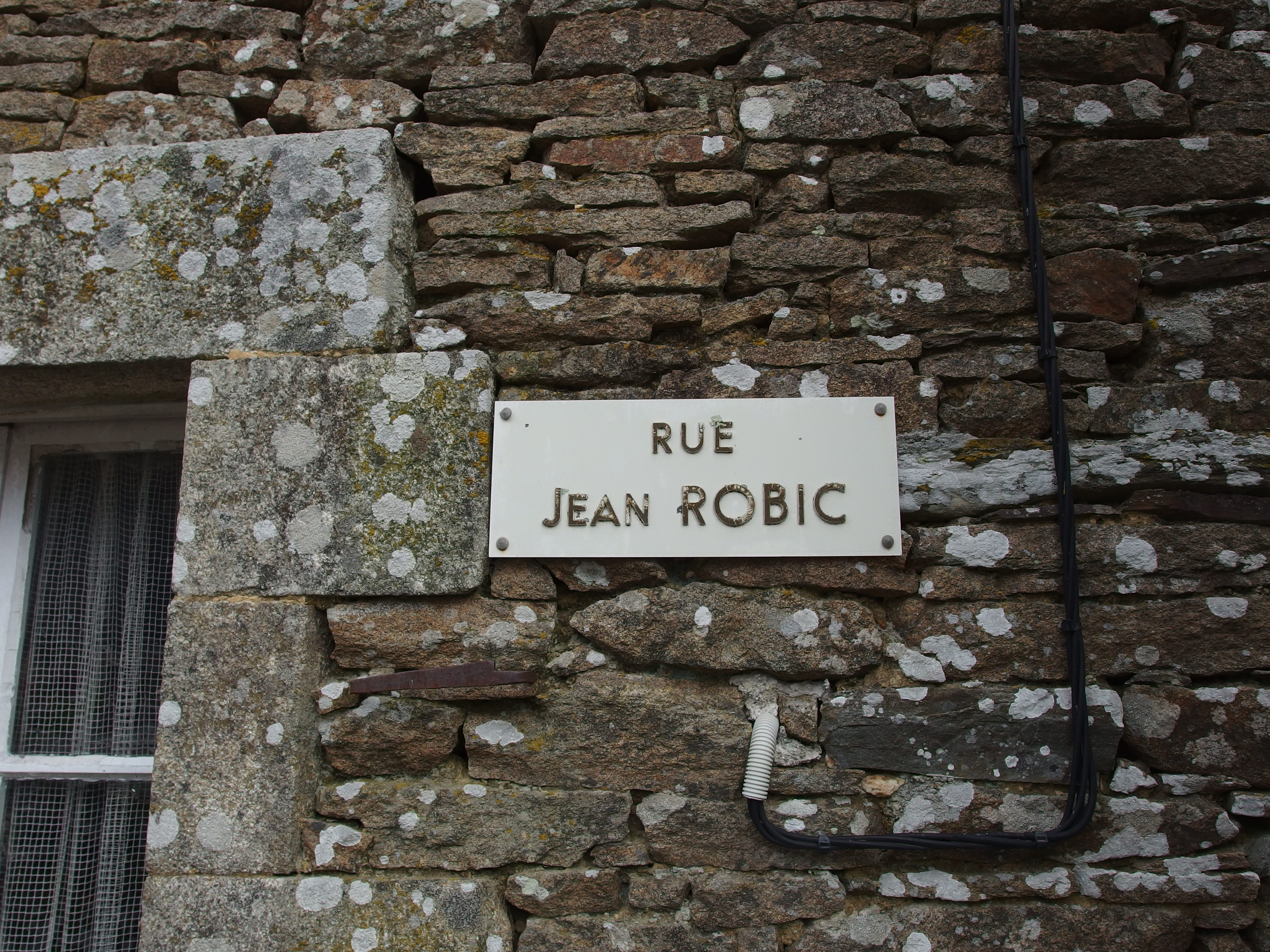 Plaque de la rue Jean-Robic à Radenac. Située le long de l'église, c'est dans cette rue que se situe la maison où Jean Robic a vécu.